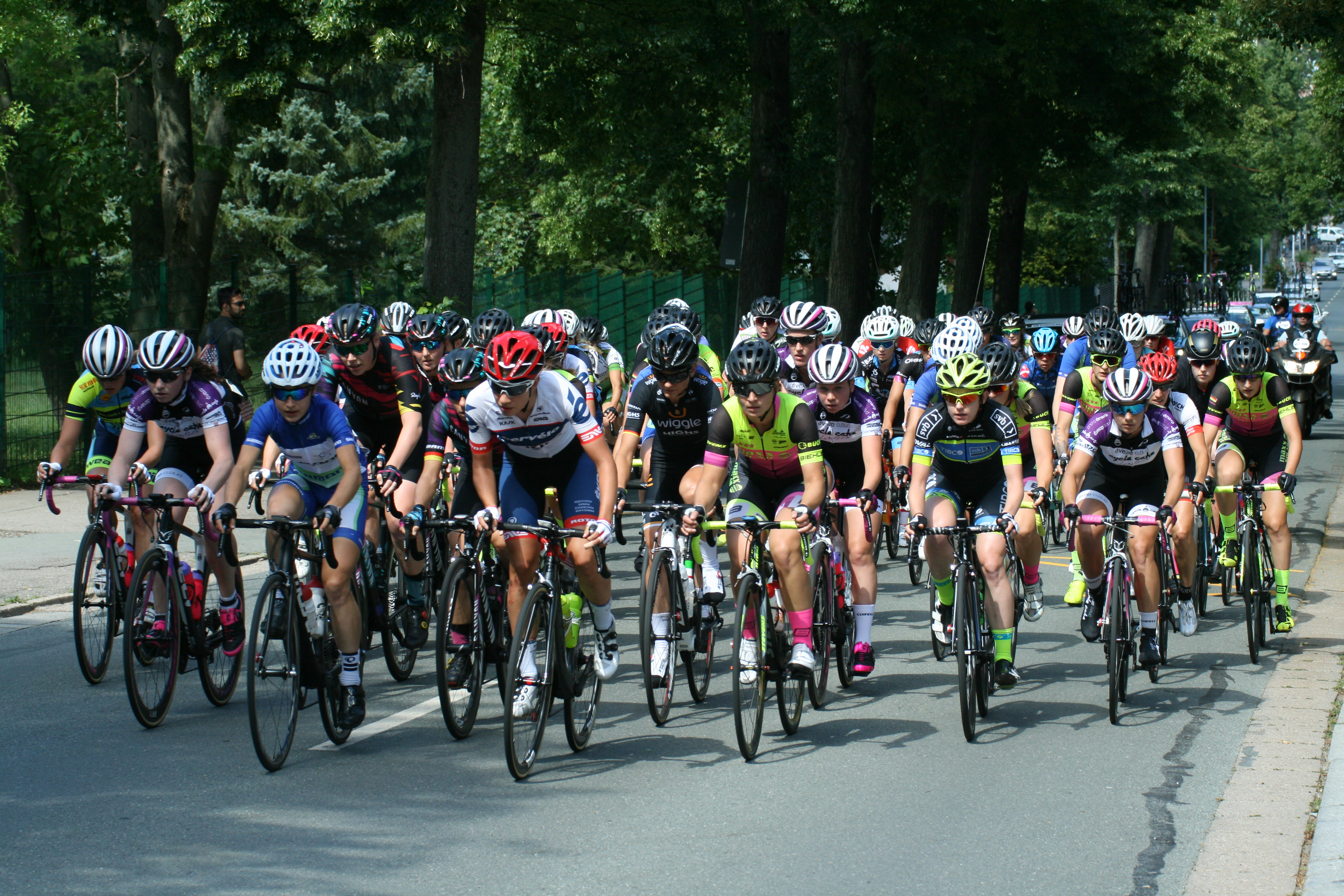 Deutsche Straßen-Radmeisterschaften 2017 in Chemnitz: Das Feld der Frauen beim Straßenrennen ca. 4 km nach dem Start. Straßenrennen Feld der Frauen ca. 4 km nach dem Start